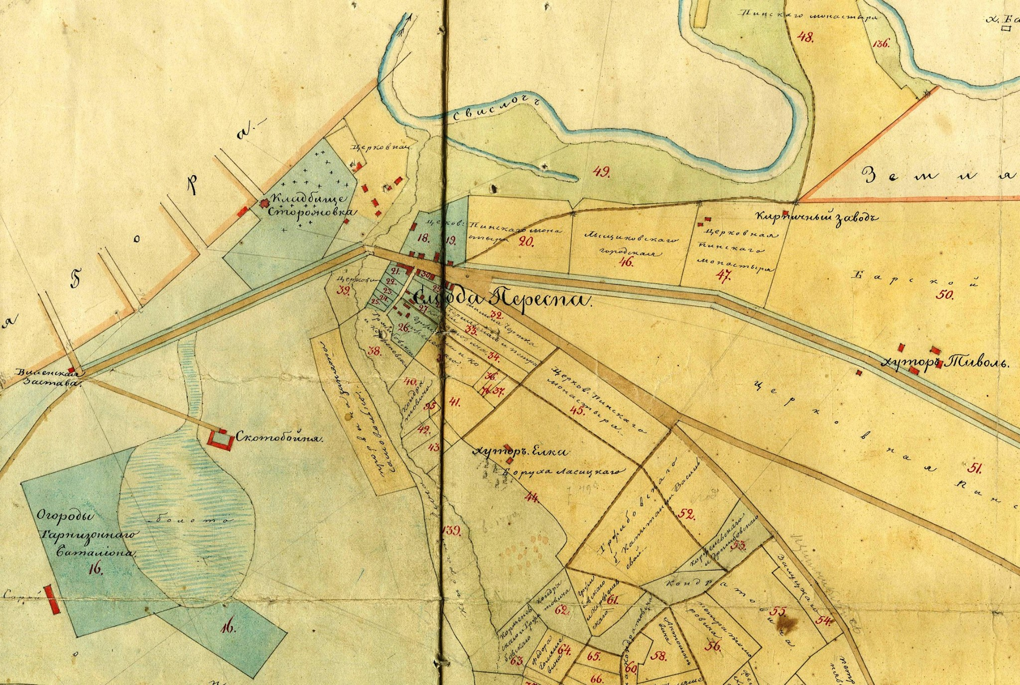 Беларуская (тарашкевіца): Менск (Miensk), Пярэспа (Piarespa) і Старажоўка (Staražoŭka)